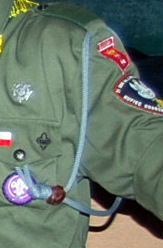 Brązowy suwak na sznurze funkcyjnym